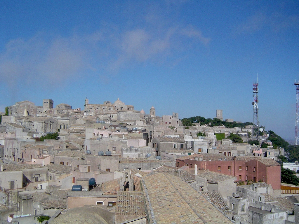 Erice (TP), centro storico